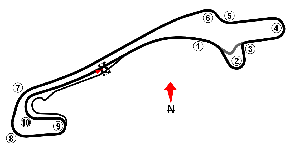 Circuito da cidade de Londrina no Parana